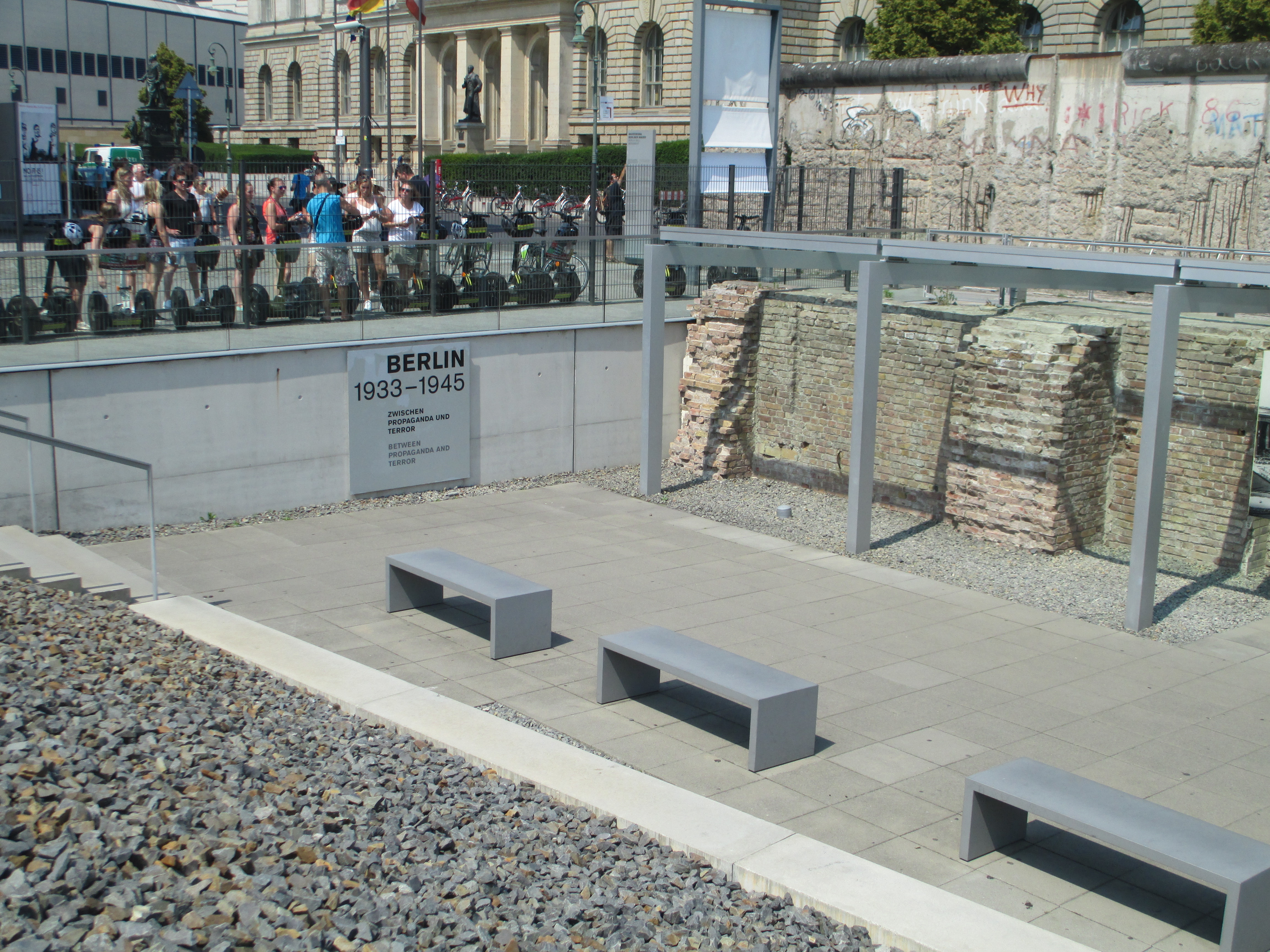 שרידי מרתף הגסטפו במוזיאון הטופוגרפיה של הטרור בברלין